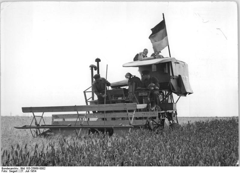 Jahna, Getreideernte mit Mähdrescher Zentralbild Siegert 27.7.54. Stalinez S 4 arbeitet auch auf durchweichtem Boden. Auf den Feldern der Landwirtschaftlichen Produktionsgenossenschaft Jahna, Kreis Meißen, arbeiten zwei Mähdrescher des Typ Stalinez S 4 von der Maschinen-Traktoren-Station Schletta. Um das Einsinken der schweren Maschine auf dem noch durchweichten Boden zu verhinder, sind sie mit Doppelreifen versehen worden.